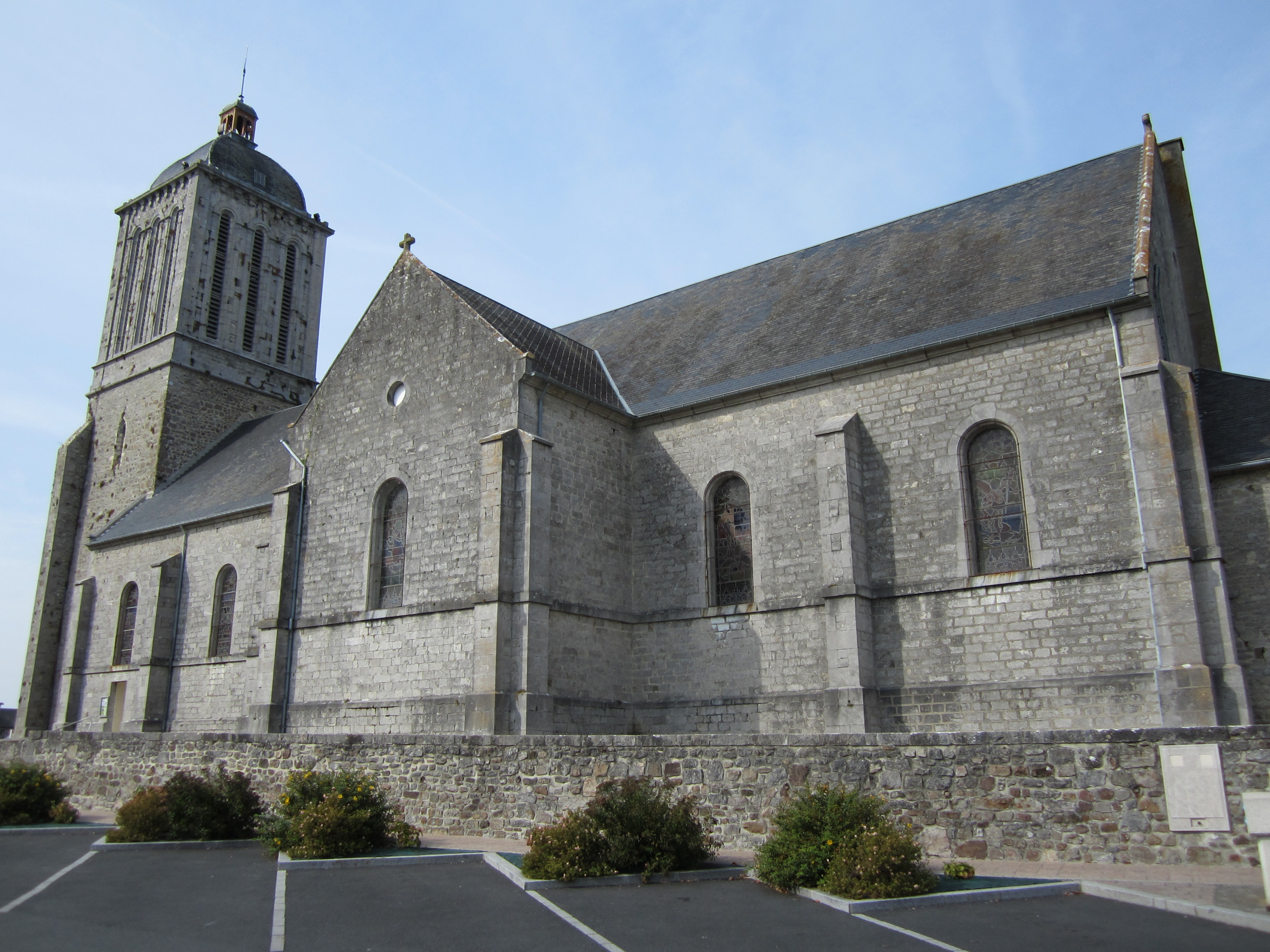 église Saint-Martin de Montmartin-sur-Mer